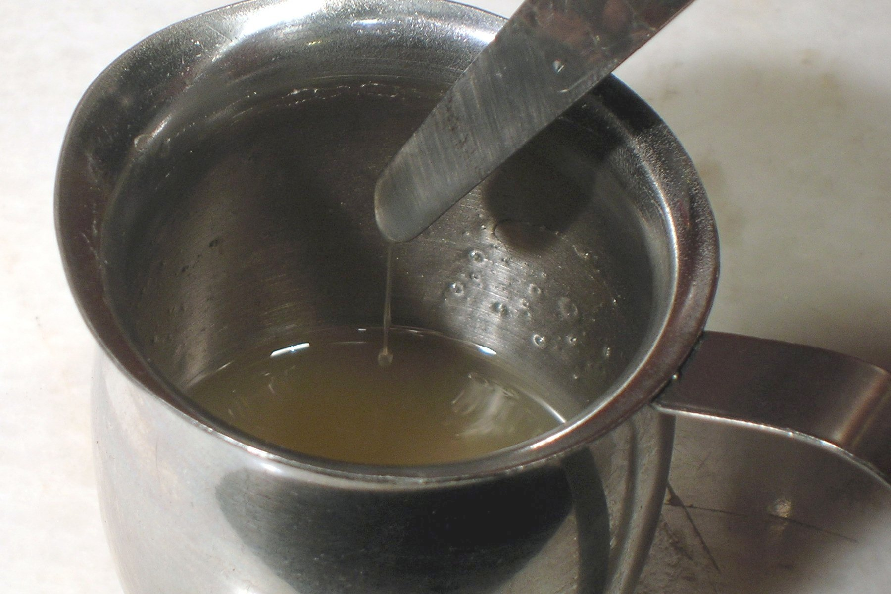 Hot hide glue